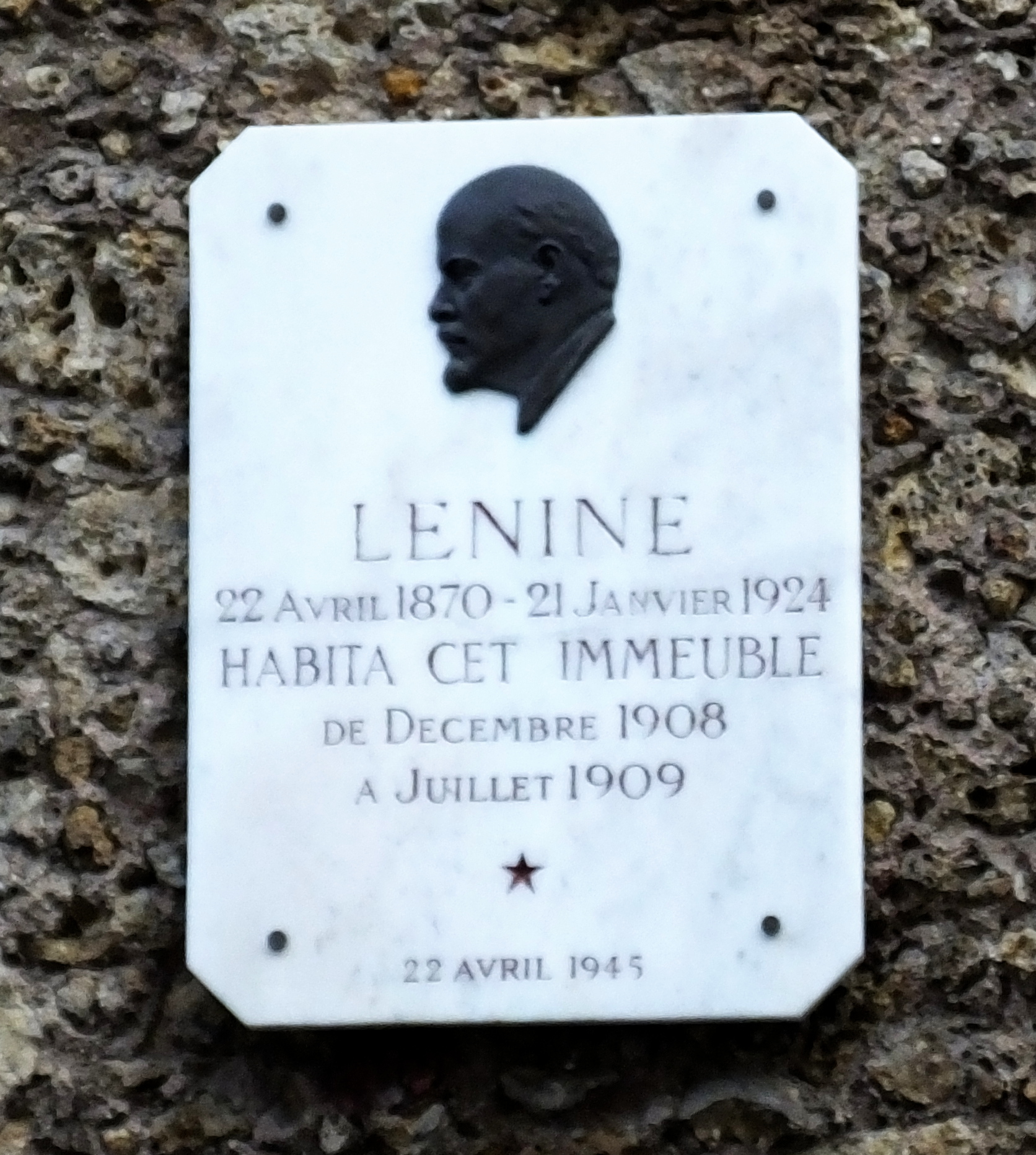 Kamienica przy Rue Beaunier 24 w Paryżu, w której przejściowo mieszkał Lenin.